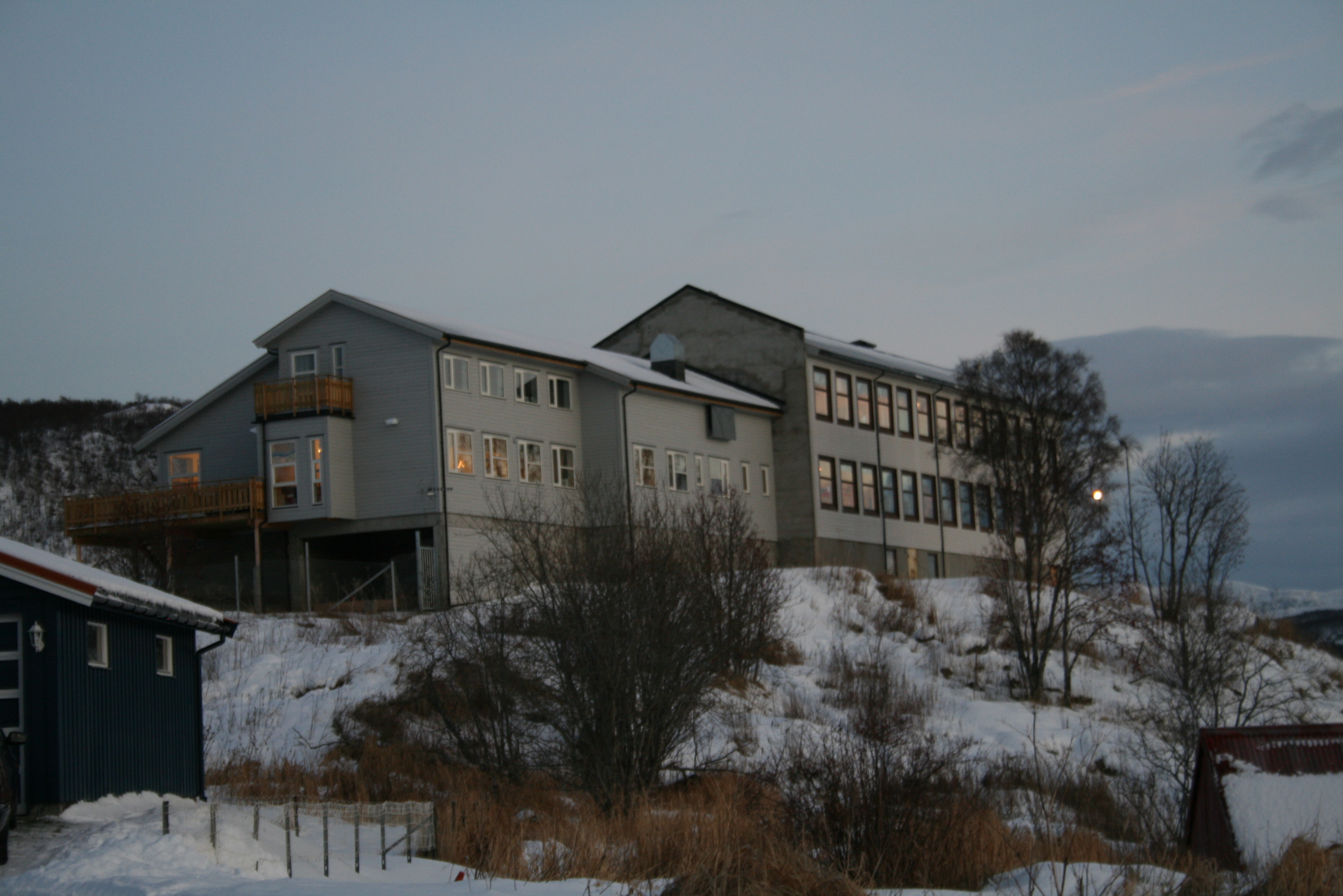 Gausvik skole med nybygde Smeskogan barnehage fremst. Tatt desember 2008.